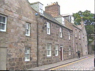 High Street, Old Aberdeen, Scotland- looking towards Aberdeen University. Aberdeen (Ecosse) maisons dans High Street